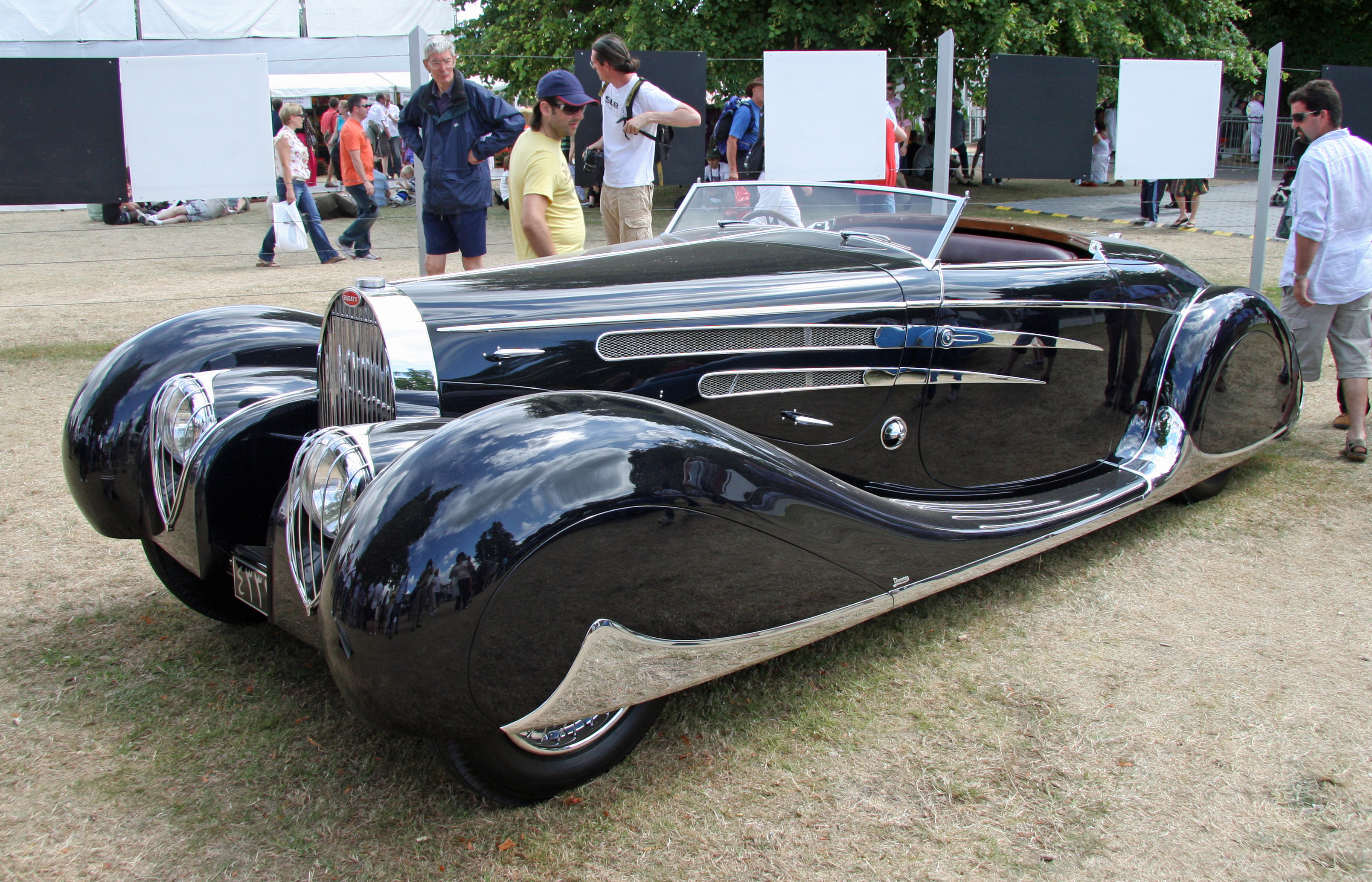 1939 Bugatti Type 57C Van Vooren Cabriolet